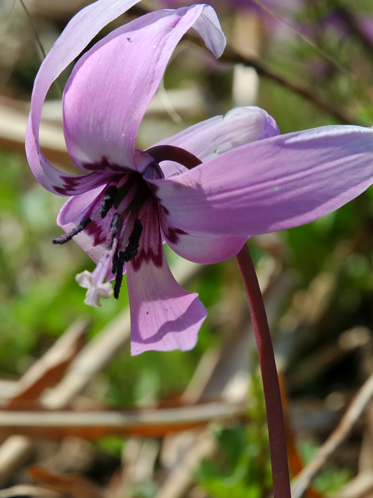 Erythronium japonicum (Katakuri, カタクリ)